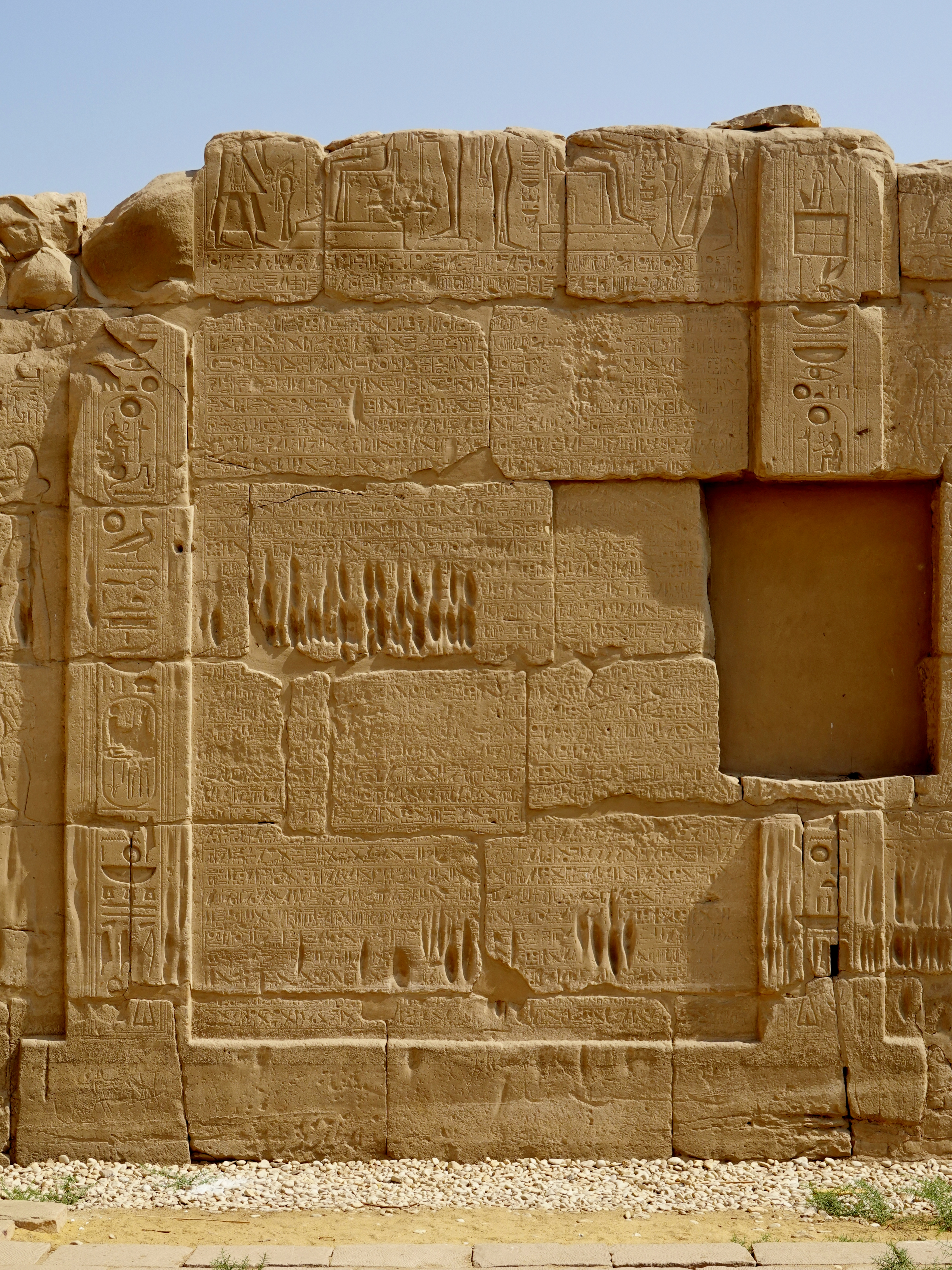 Ägyptisch-Hethitischer Friedensvertrag an der westlichen Außenwand des Cachette-Hofes im Tempel von Karnak, Luxor, Ägypten